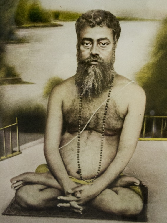 Template:Vishuddhananda Paramahansa in Lotus Position